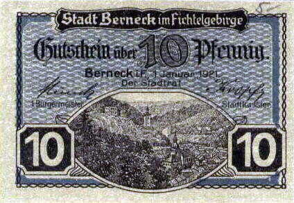 Notgeld aus Berneck ("Stadt Berneck im Fichtelgebirge"): Gutschein über 10 Pfennig von 1921